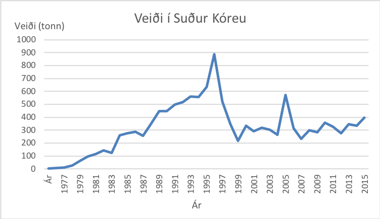 Veiði á norðlægum snákshaus í Suður-Kóreu